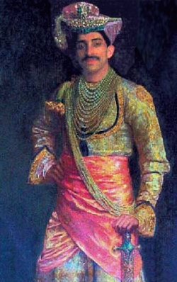 Tukoji Rao Holkar III, Maharaja of Indore